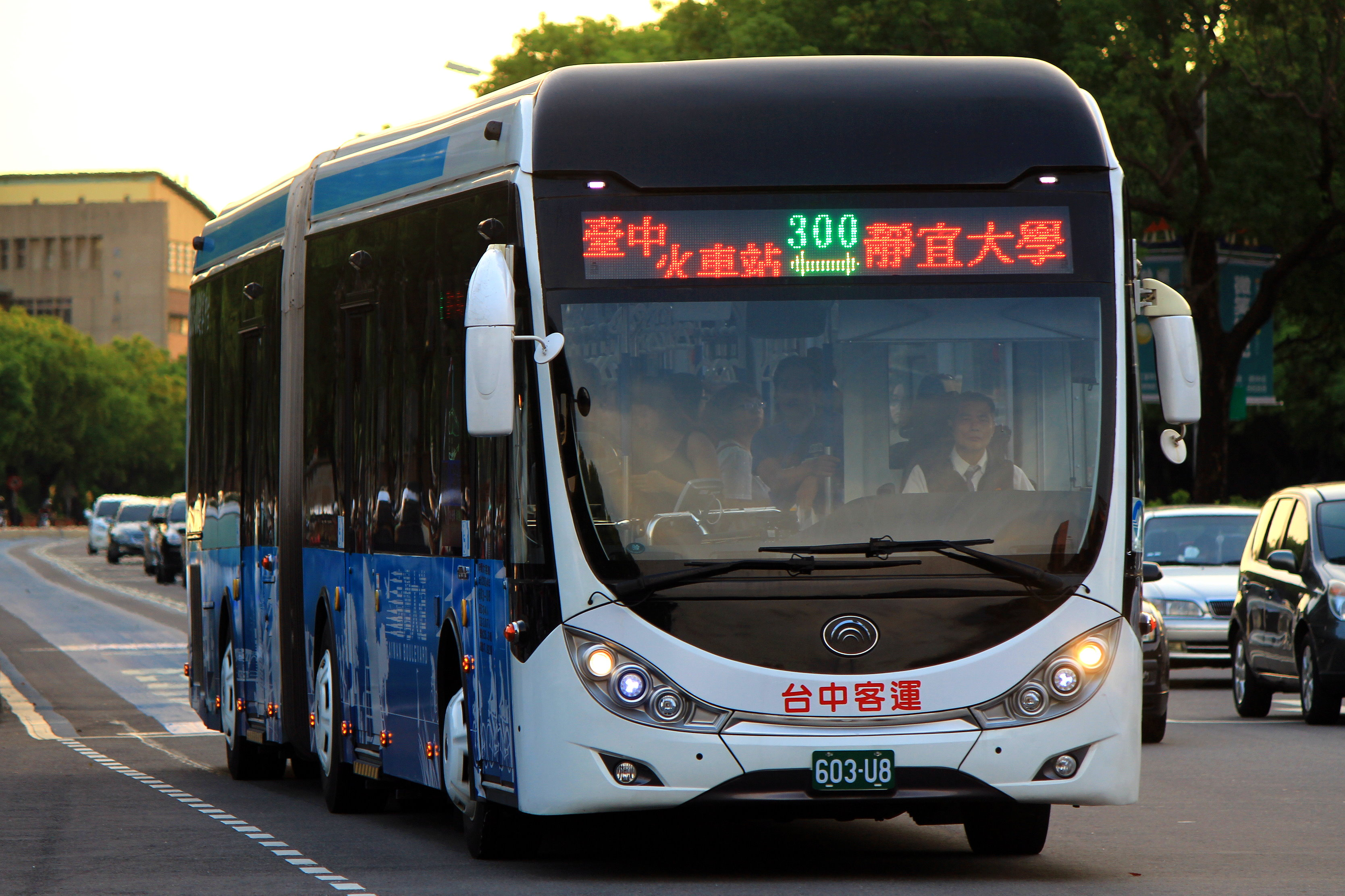 中文（台灣）: 2014年臺中客運宇通ZK6180HGC雙節低底盤大客車603-U8，行駛臺中市公車300路。